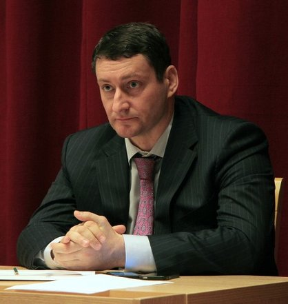 Депутаты Законодательного собрания Кировской области согласовали кандидатуру Романа Антонова на должность первого заместителя председателя правительства